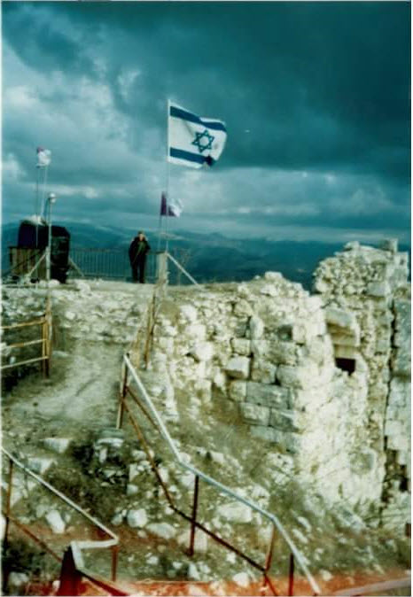 מוצב צה"ל על מבצר הבופור ברצועת הביטחון בדרום לבנון .(התמונה צולמה על ידי ואדים)